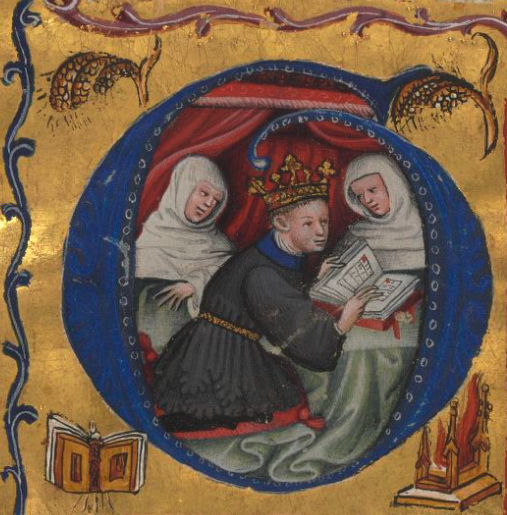 Alfons el Magnànim, V d'Aragó, III de València, I de Nàpols, Sicília i Mallorca, II de Sardenya, i IV de Barcelona, ( Medina del Campo, Castella 1396 - Nàpols 1458 ), Rei d'Aragó, de València, de Mallorca, de Sicília , de Sardenya (1416-1458) i de Nàpols (1442-1458); Comte de Barcelona